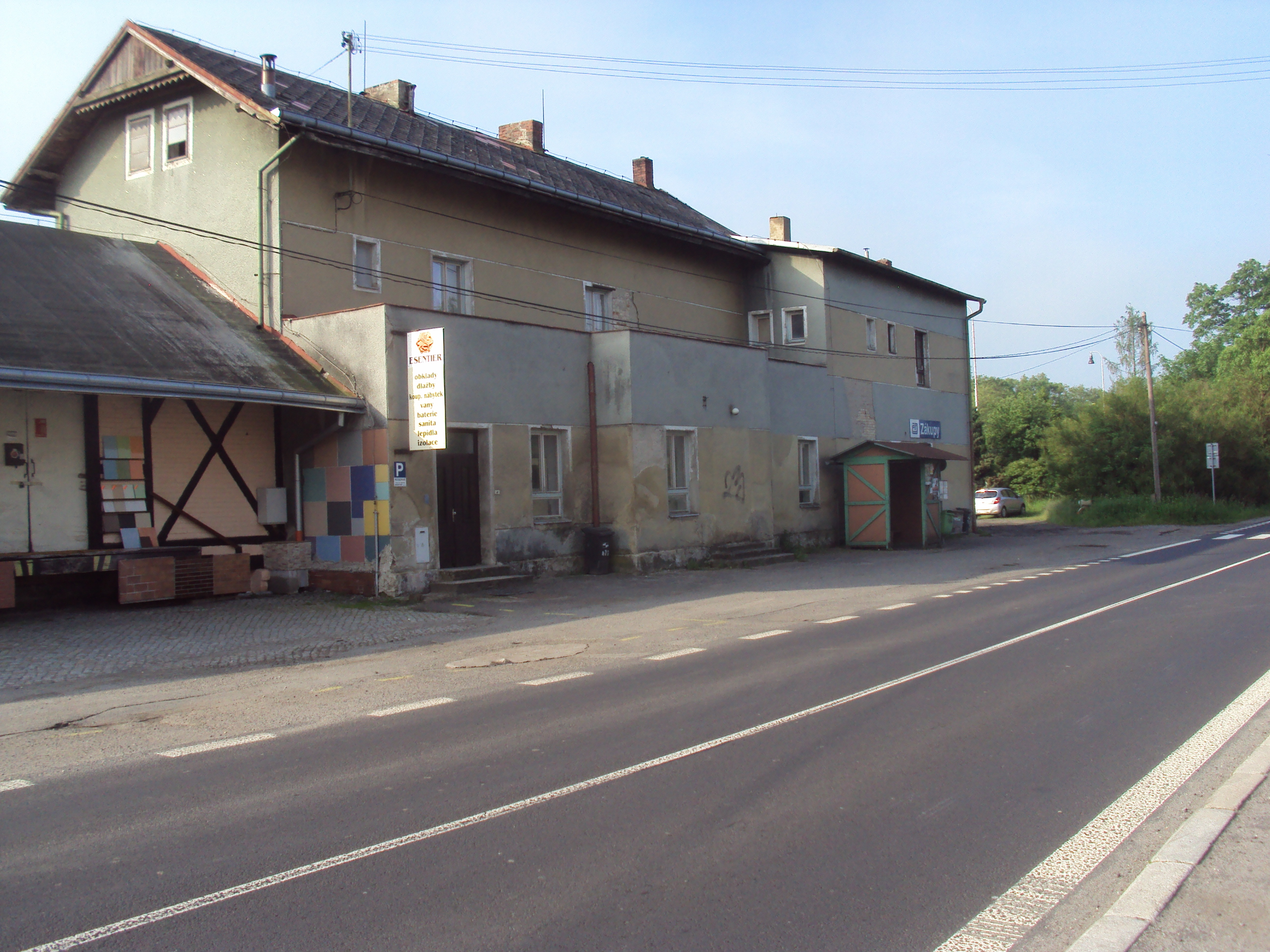 Nádražní budova zvenčí, z Nádražní ulice